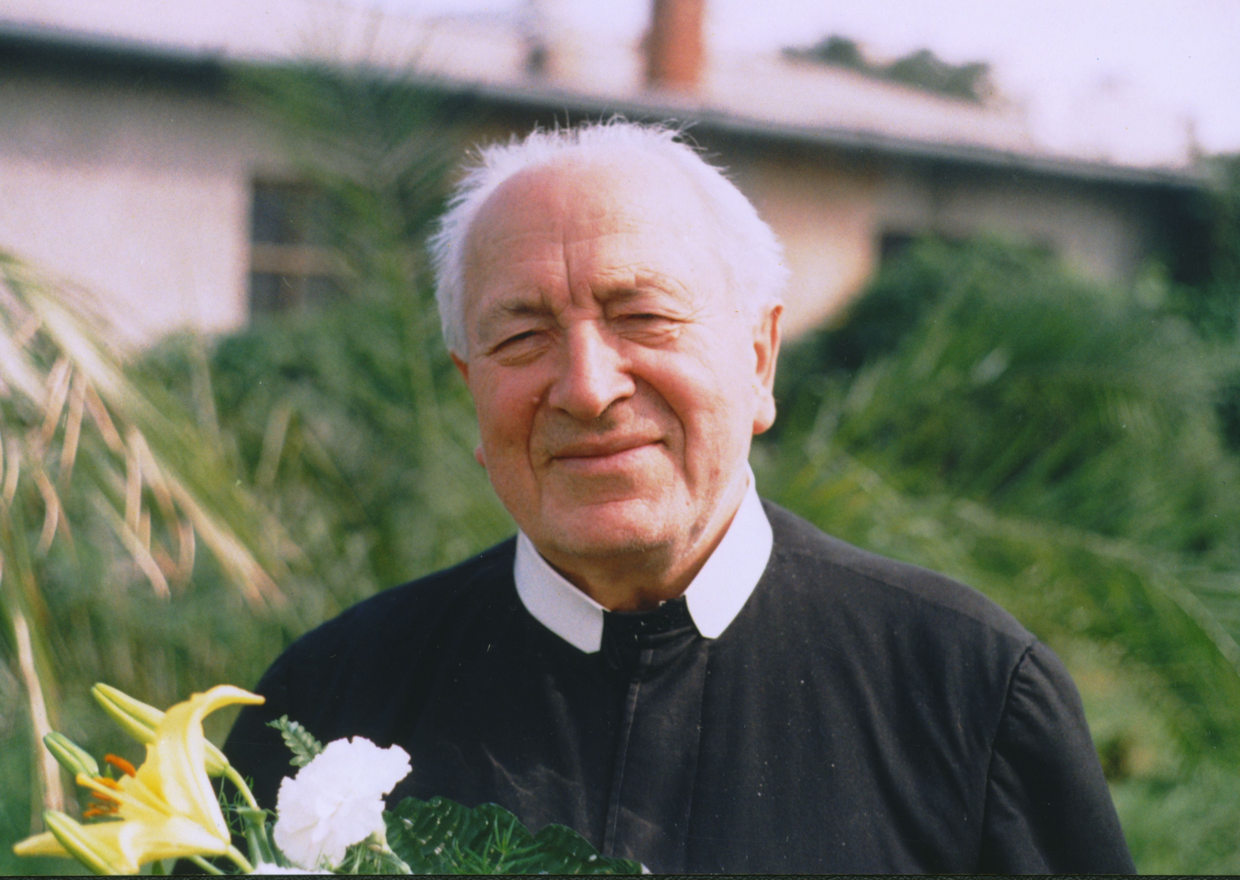 Fotografia o. Mariána Jána Potáša, OSBM, urobená v Trebišovskom baziliánskom monastieri na nádvorí v r. 1996. Photo taken by Jozafát Vladimír Timkovič, OSBM